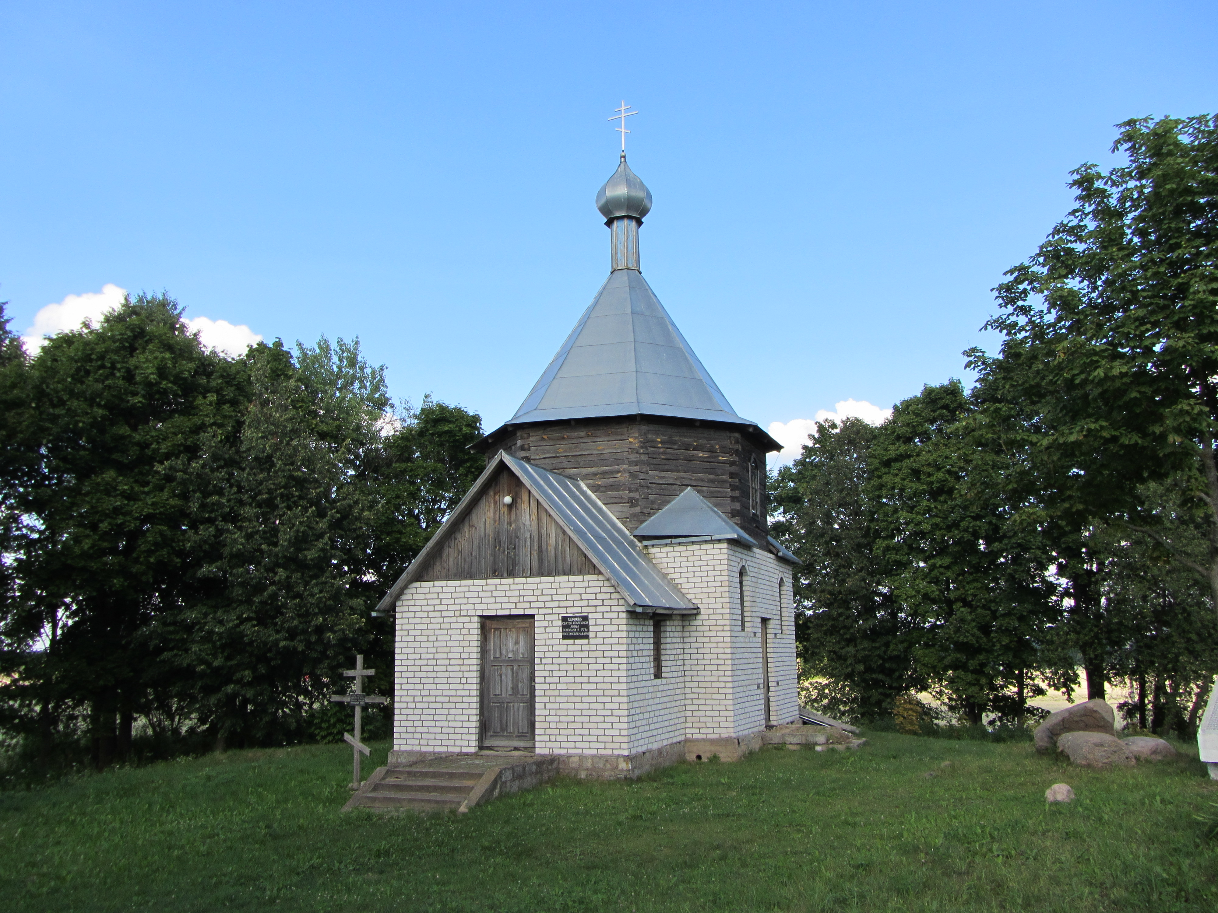 Беларуская (тарашкевіца): Царква Сьвятой Ганны, Дудзічы.